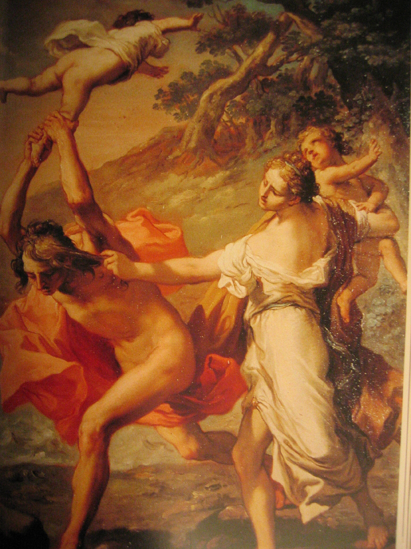 Athamas tue le fils d'Ino Commentaire: Lieu: Collezione Molinari Pradelli, Marano di Castenaso Auteur: Gaetano Gandolfi Date: 1801 Nature: huile sur toile Dimension: 92x63cm